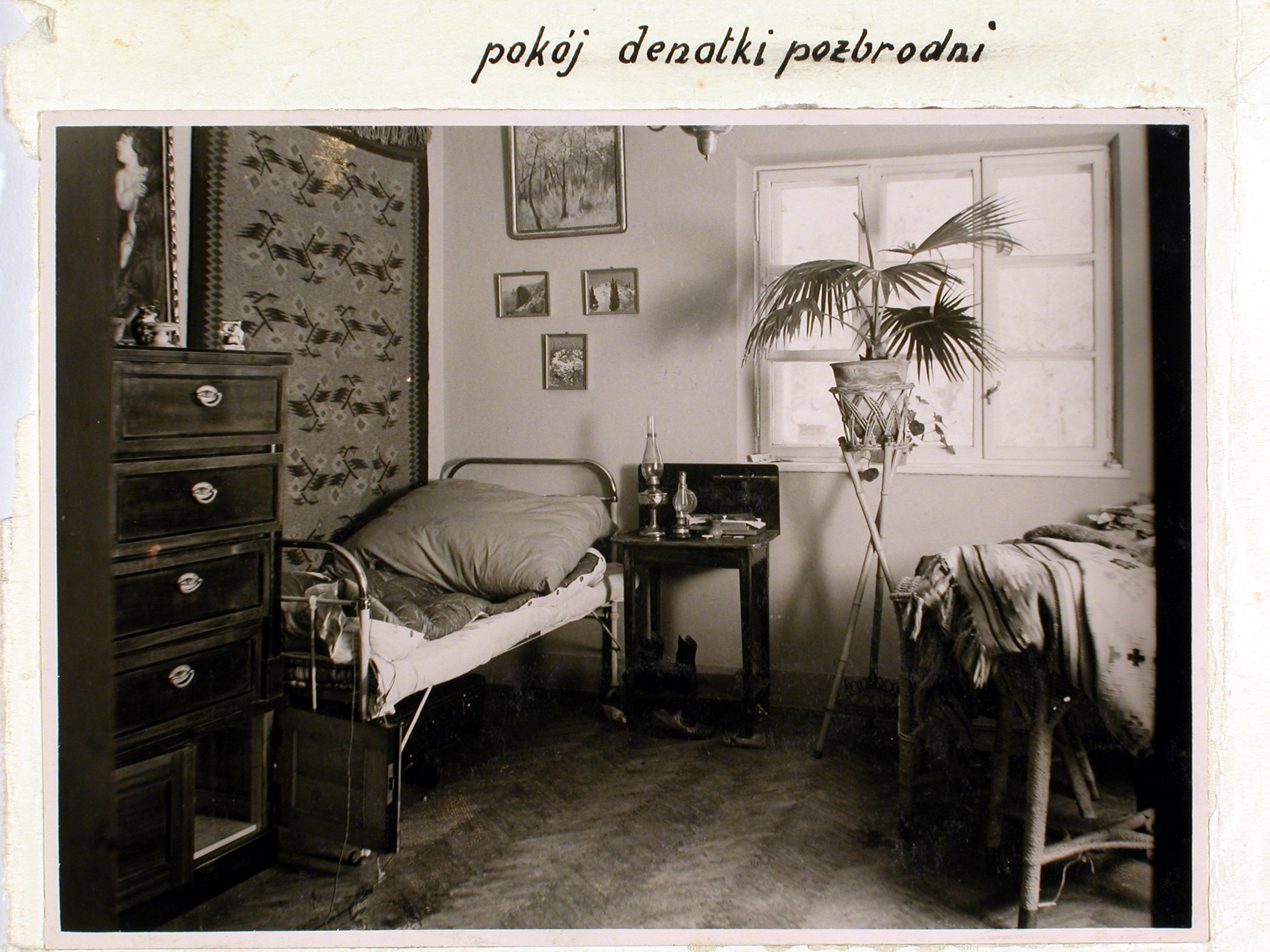 Zdjęcie pokoju denatki, z akt sprawy Gorgonowej